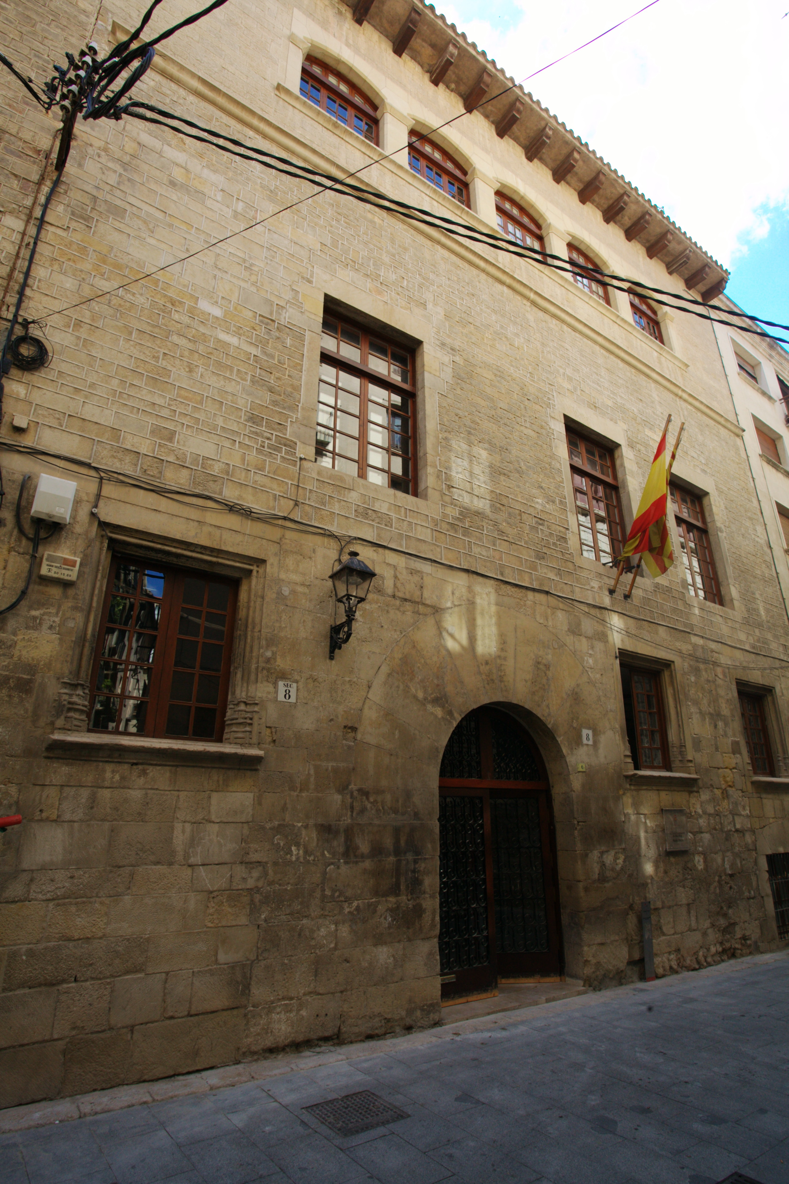 Palau Oriol (Tortosa) Object location40° 48′ 47.54″ N, 0° 31′ 18.9″ E